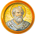 Médaillon de la frise des papes à Saint-Paul-hors-les-Murs. Il s'agit d'une mosaïque représentant Boniface IV, 67e pape de l'Église catholique (25 août 608-8 mai 615). Il fait parie de la série de médaillons voulue par Grégoire XVI destinée à remplacer ceux de l'ancienne basilique après l'incendie de 1823.